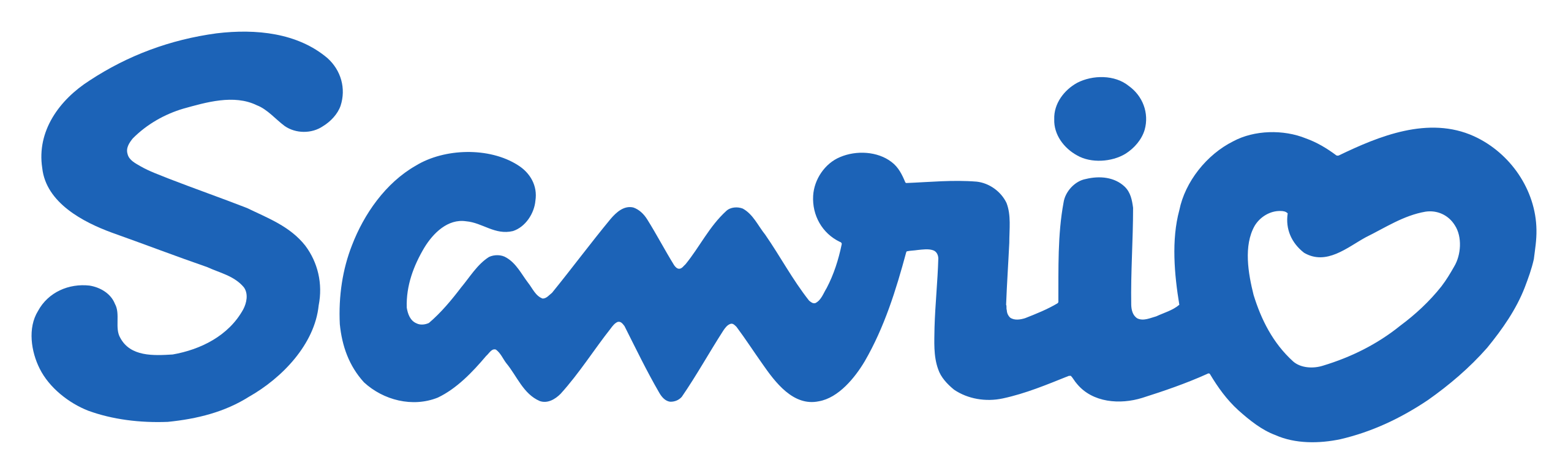 サンリオのロゴ